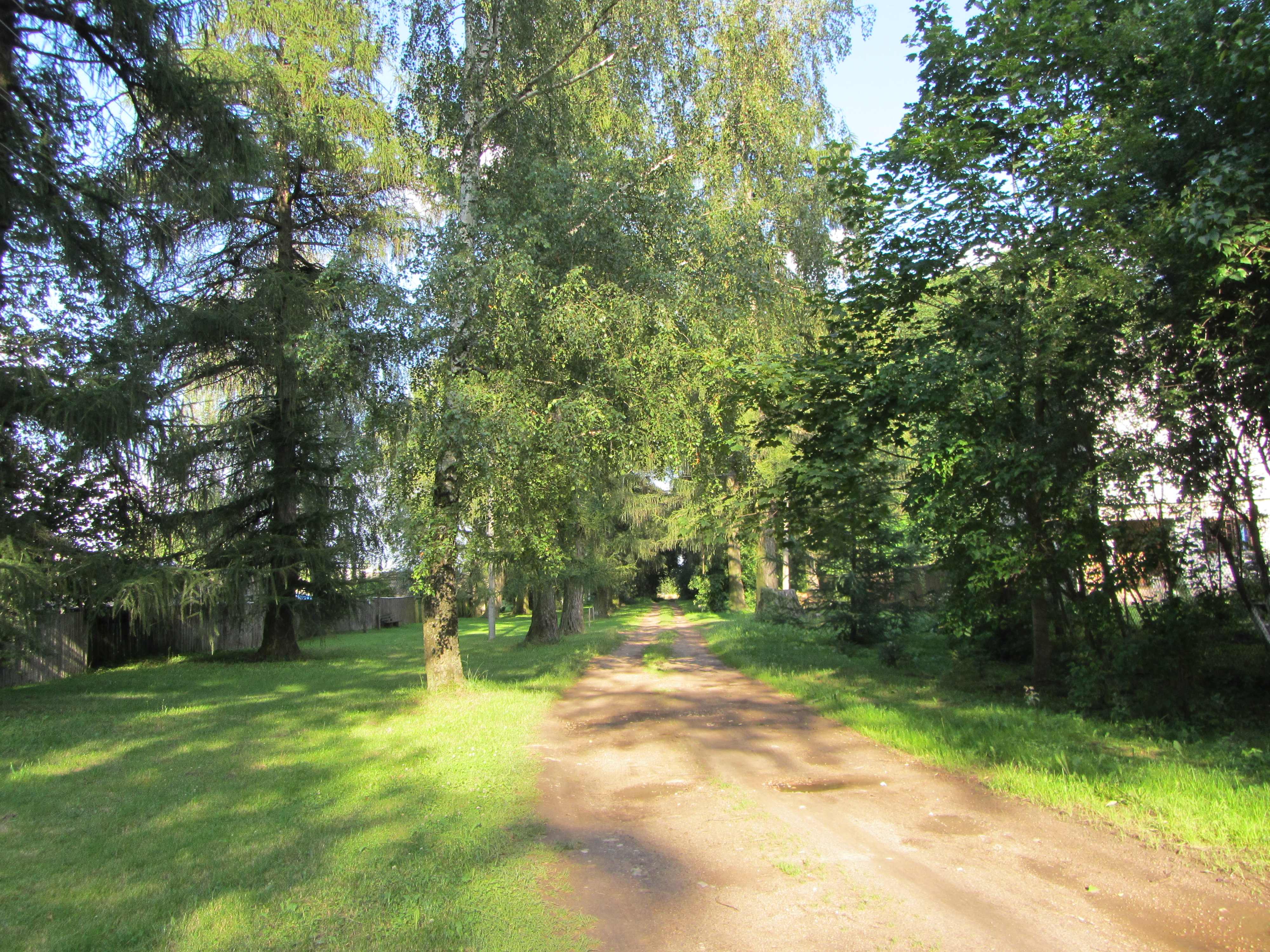 Беларуская (тарашкевіца): Замосьце, рэшты сядзібна-паркавага комплексу Ельскіх